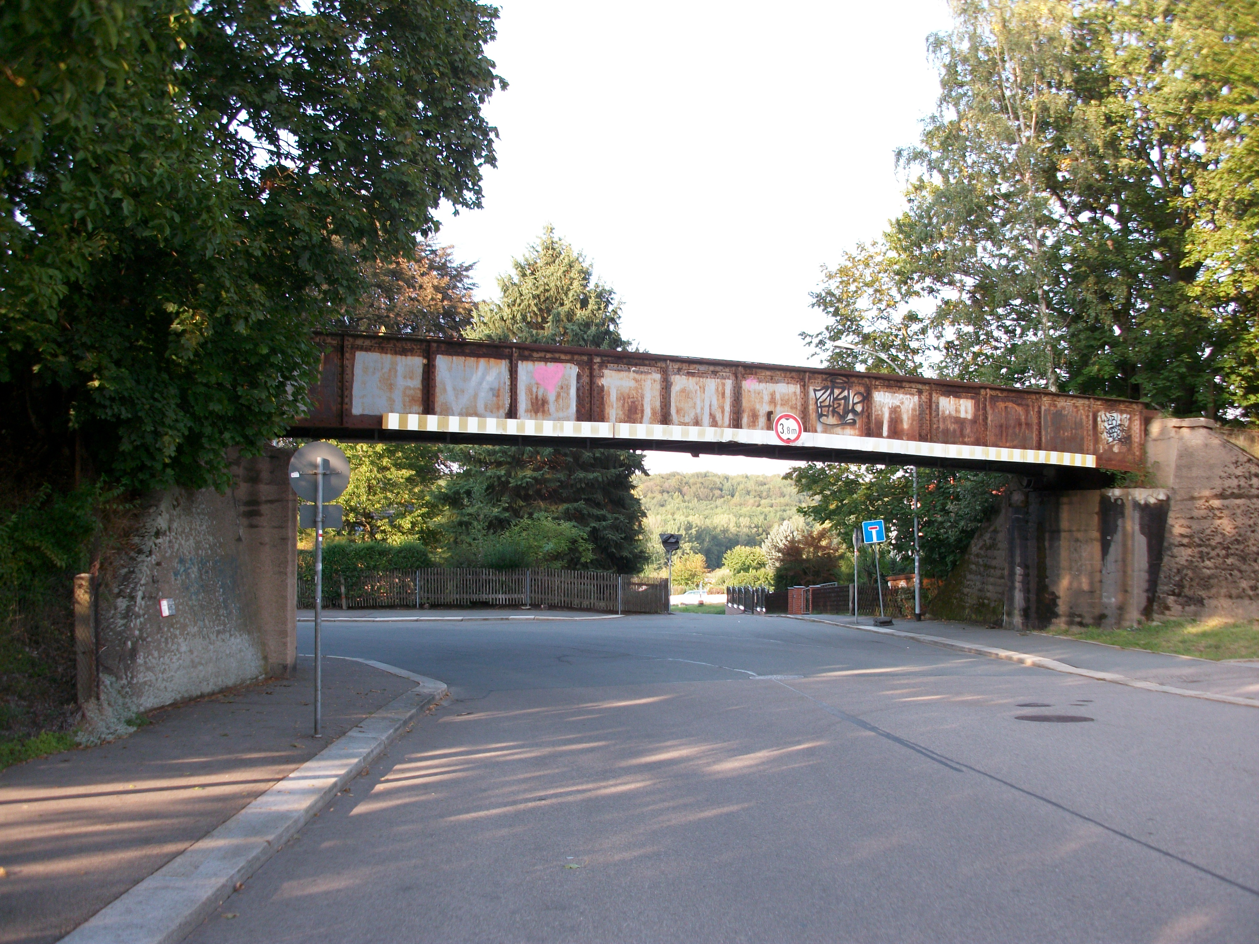 Limbach-Oberfrohna, ehemalige Bahnüberführung Peniger Straße (2019)